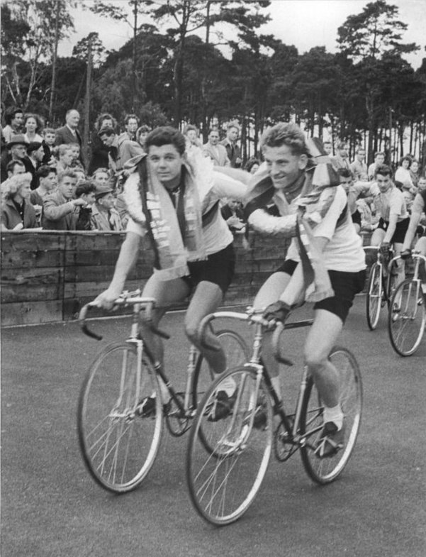 Zentralbild Mihatsch 26.8.1957 Bey-L Deutsche Meisterschaften im Zweier-Mannschaftsfahren Am Sonntag, dem 25.8.1957, fanden auf der Radrennbahn in Frederdorf bei Berlin die Deutschen Meisterschaften im Zweier-Mannschaftsfahren statt. Während sich bei den Männern Hans Wagner-Heinz Wahl (Einheit Berlin) überlegen den Meistertitel erkämpften, setzten sich bei der Jugend Jochen Wangermann-Horst Busse (SC Rotation Leipzig) durch. UBz: Die Jugendmeister Wangermann-Busse auf der Ehrenrunde.